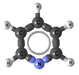 Pyridin - py